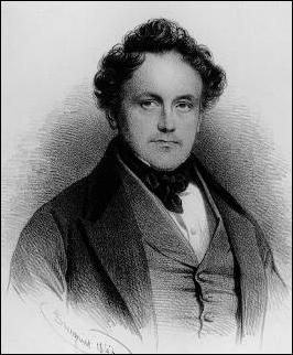 Jean-François Henot (1799-1865)